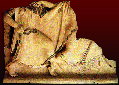 Reggio Calabria: lastra fittile rinvenuta nel santuario dell'area Griso Laboccetta